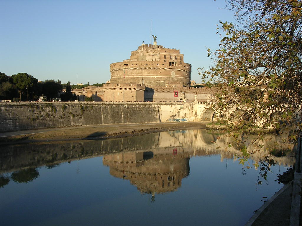 Castel Sant'Angelo, Rome Vista del Castillo Sant'Angelo desde el otro lado del Tíber. View of Castel Sant'Angelo across the river.